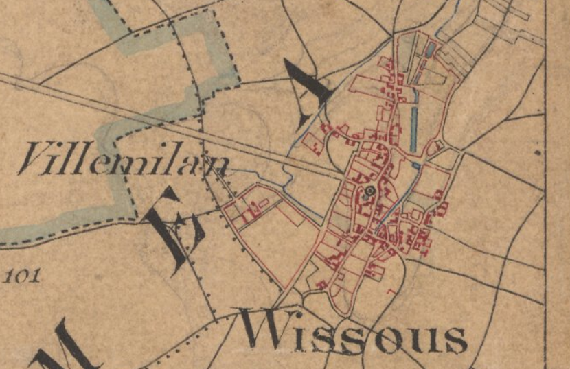 Extrait de la feuille "Melun Nord-Ouest" de la carte d'Etat-Major de 1866 - Extrait afin de centrer sur la commune de Wissous.